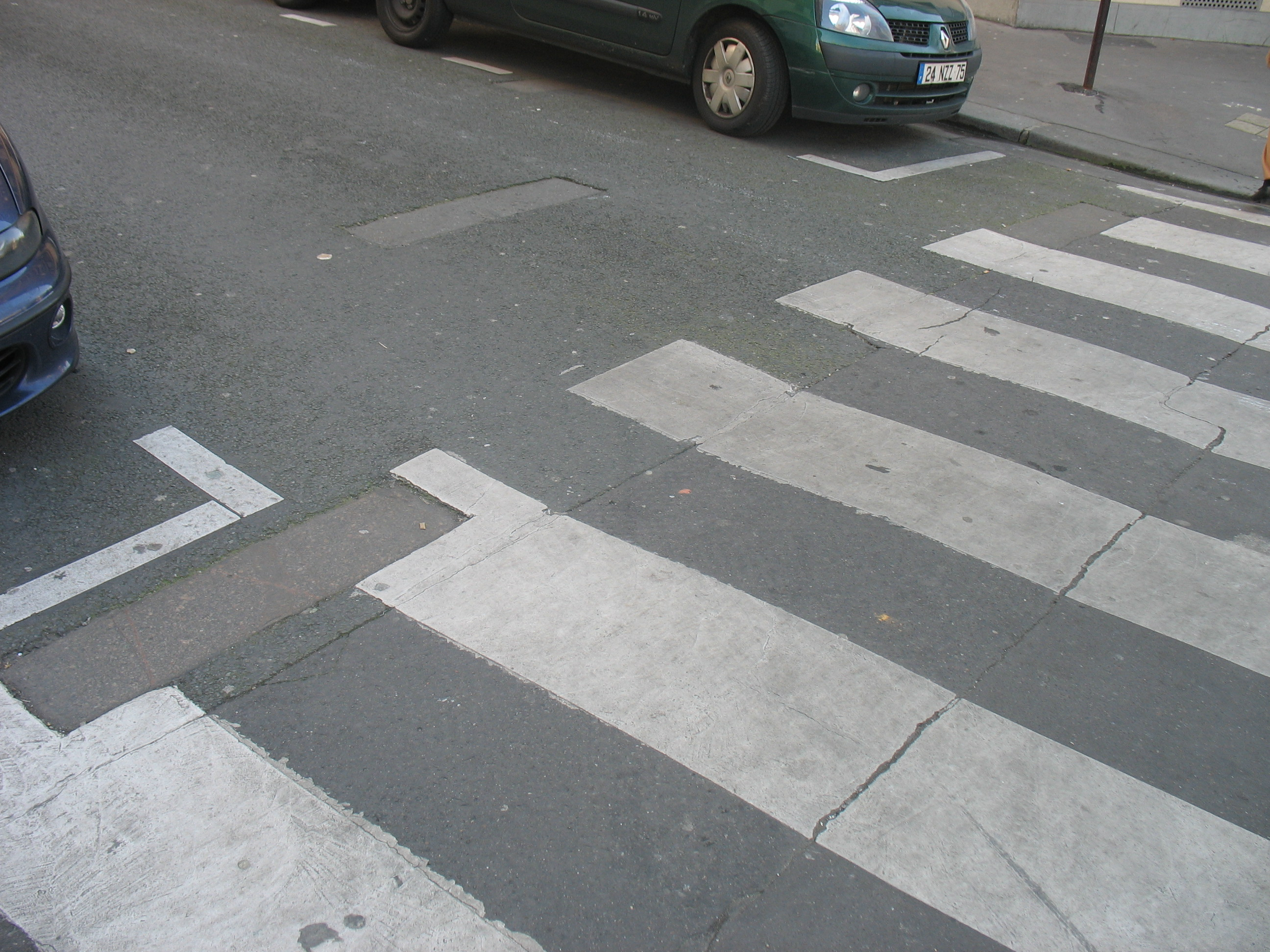 Emplacement des dalles destinées à accueillir les pieds de l'échafaud de la guillotine devant l'ancienne prison de la Roquette à l'angle de la rue de la Croix-Faubin et de la rue de la Roquette. On voit sur cette photo trois dalles et une partie de la quatrième sous la voiture au fond.